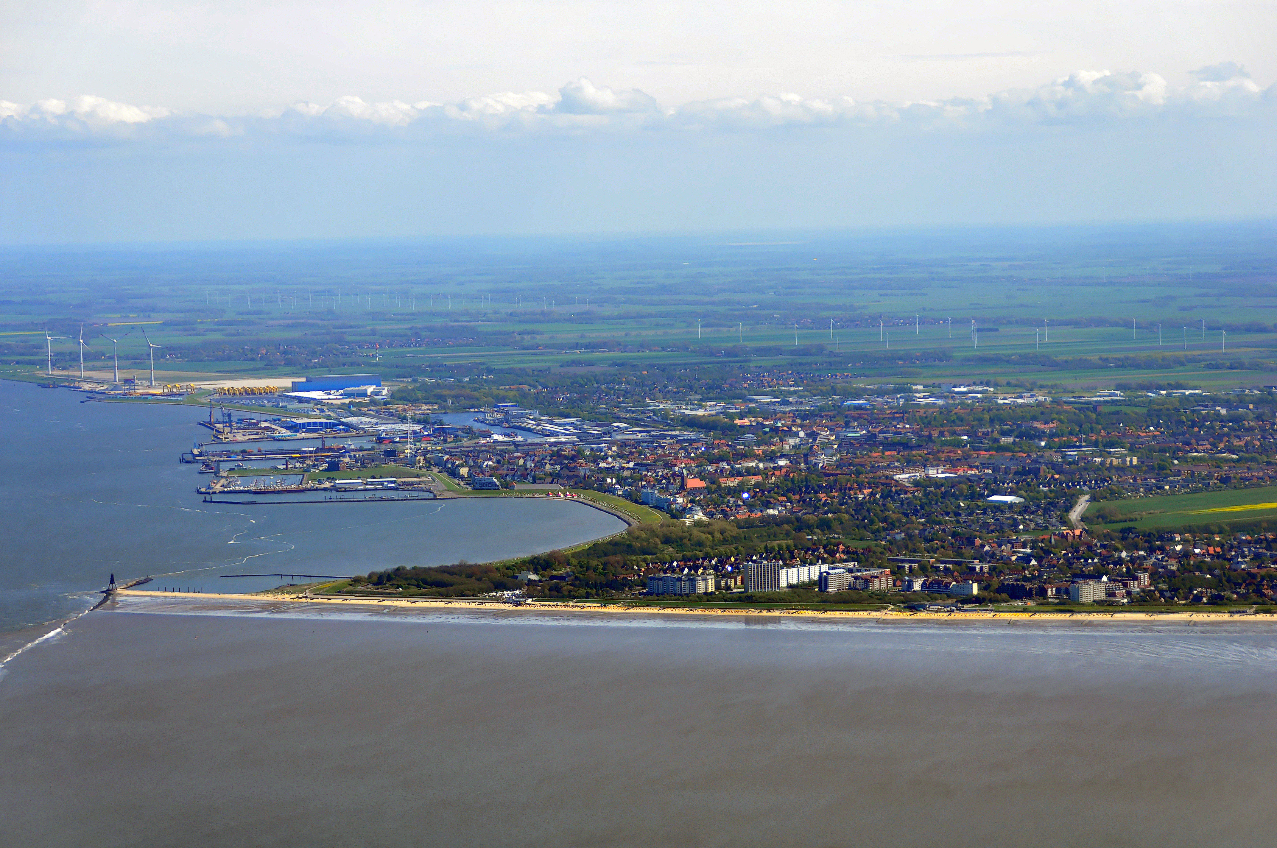 Luftbilder von der Nordseeküste 2012-04 Dieses Foto entstand aufgrund eines Projektes, das von Wikimedia Deutschland e. V. gefördert wurde. Im Rahmen des „Community-Projektbudgets“ sollen Luftbilder u.a. von Inseln, Halligen, Sanden und Küstenstädten der deutschen Nordseeküste angefertigt werden. Das Projekt „Fotoflüge“ wurde im September 2011 begonnen.